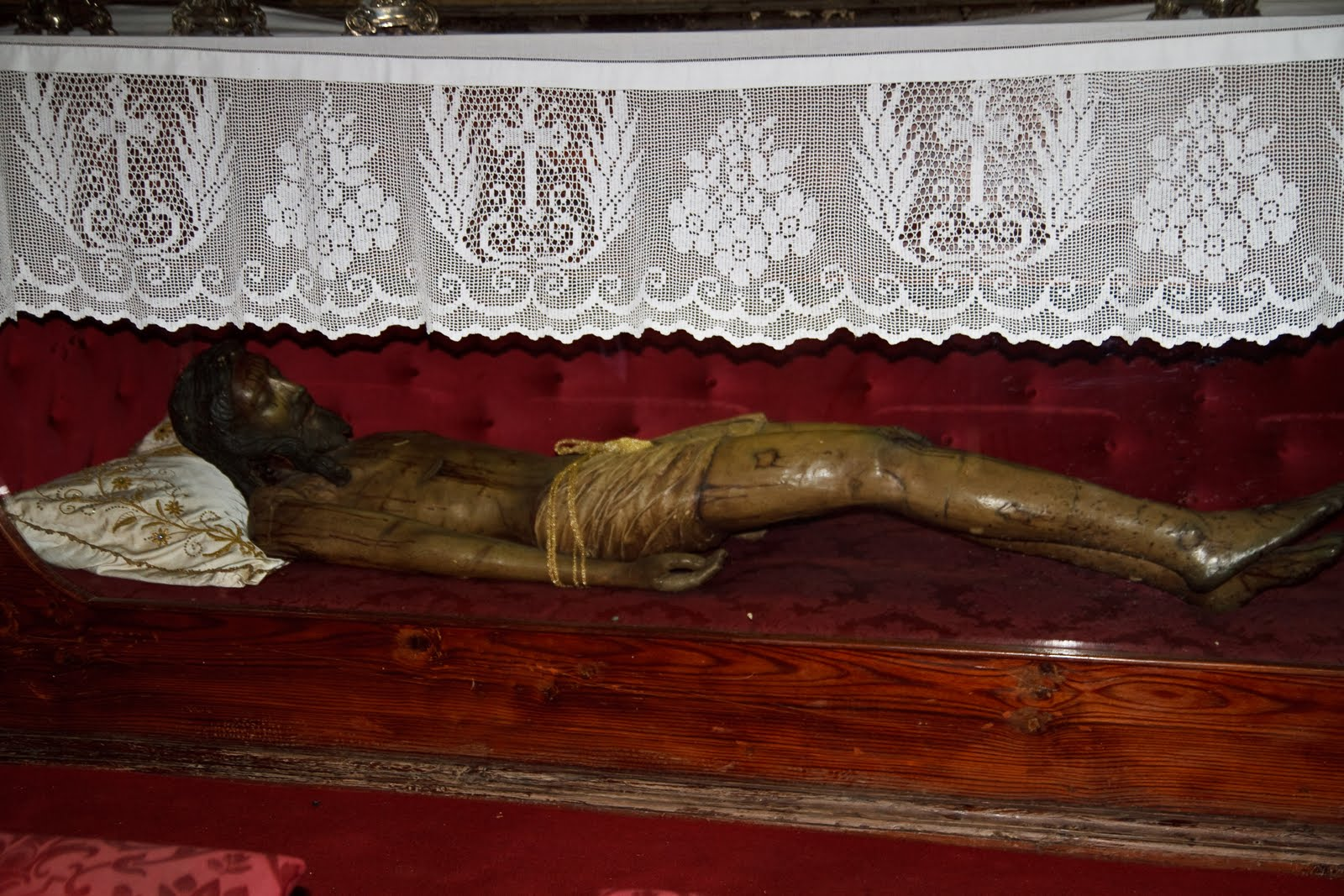 Icod de los Vinos, Santa Cruz de Tenerife, Spain